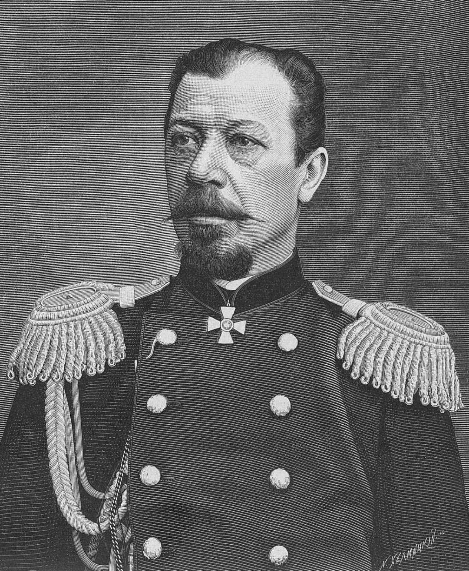 Генерал-лейтенант Черняев Михаил Григорьевич, 1882 год